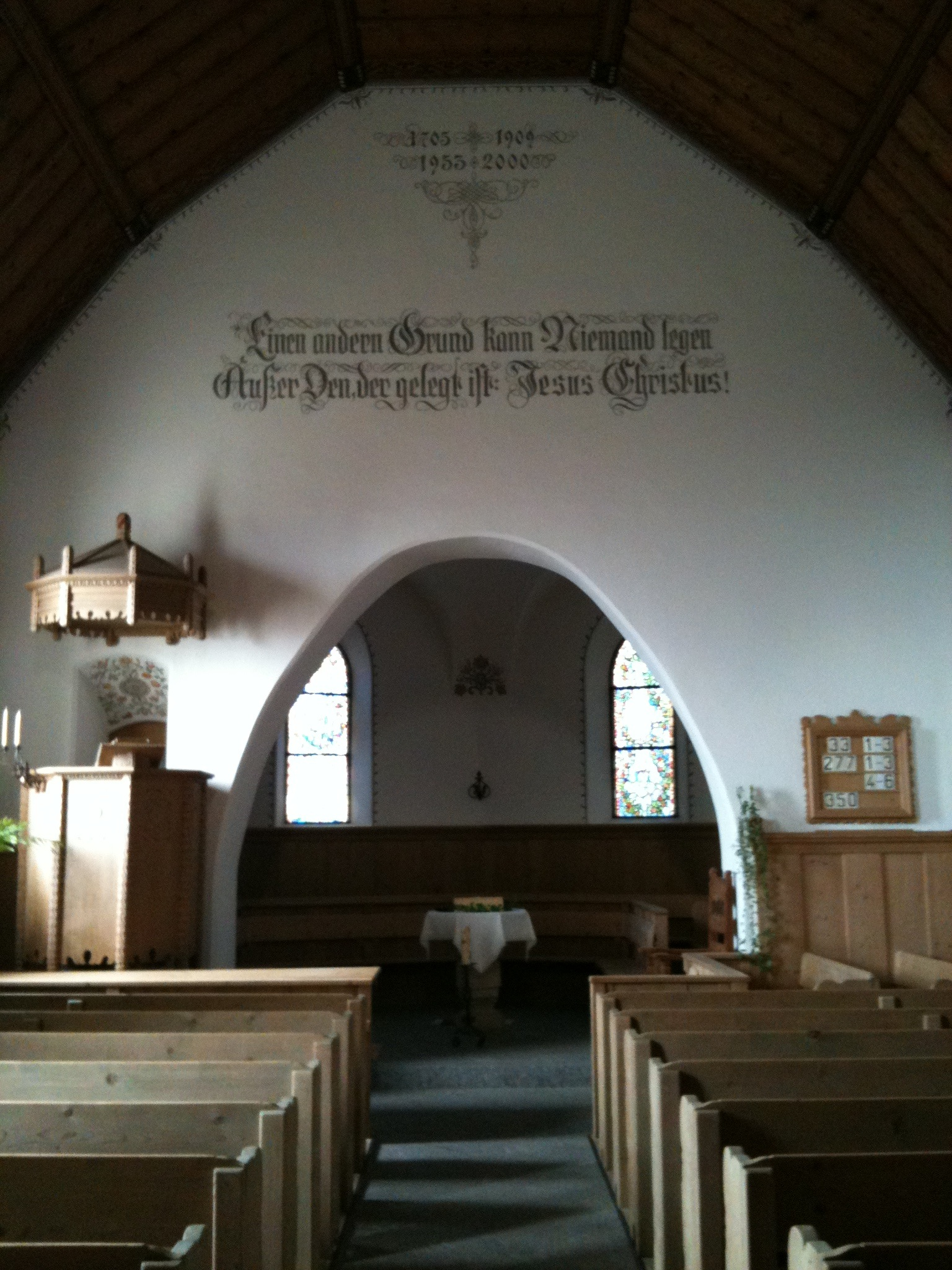 reformierte Kirche Pany, Kanton Graubünden